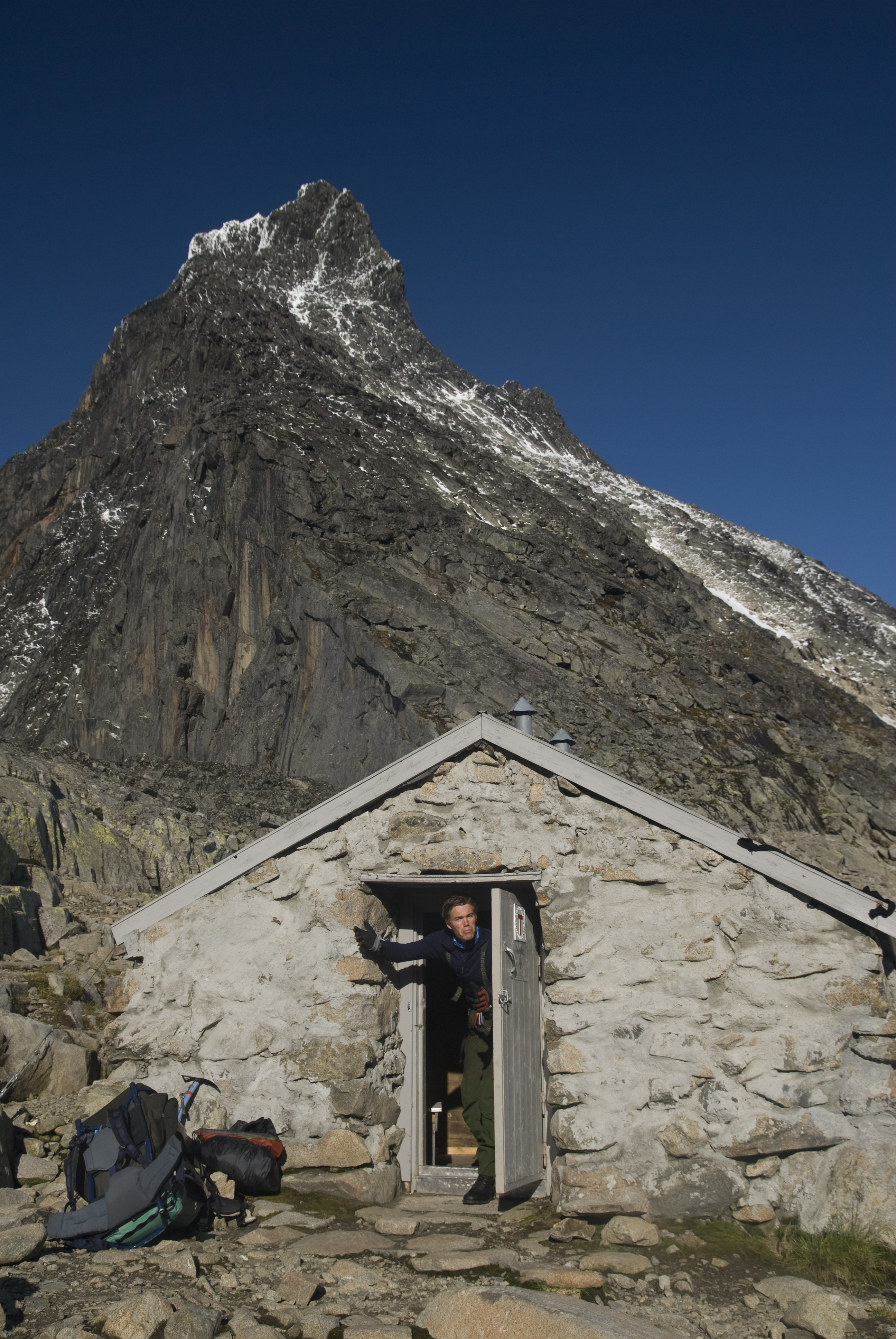 Skagastølsbu